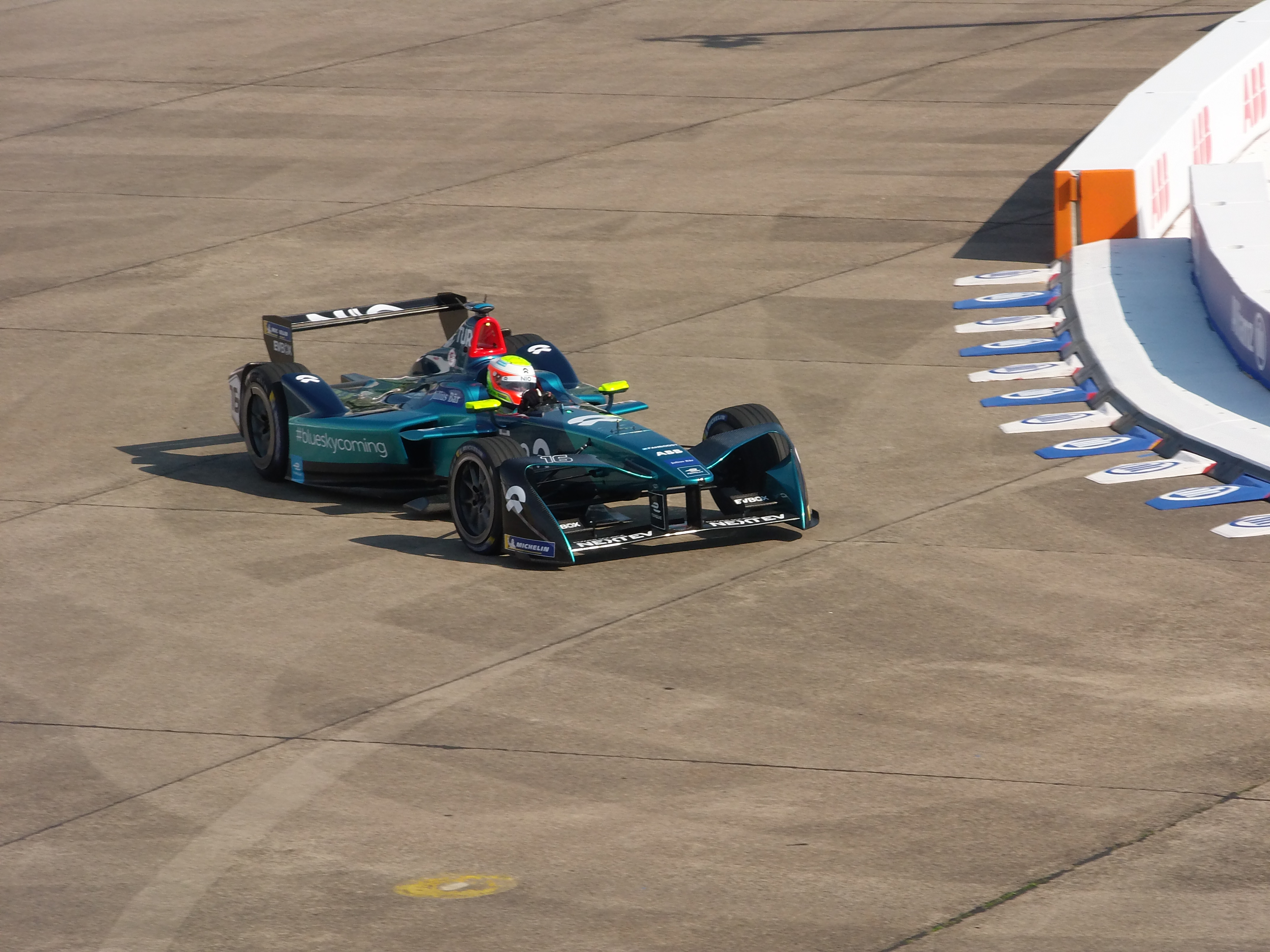 Oliver Turvey im NextEV NIO Sport 003 beim Berlin E-Prix 2018